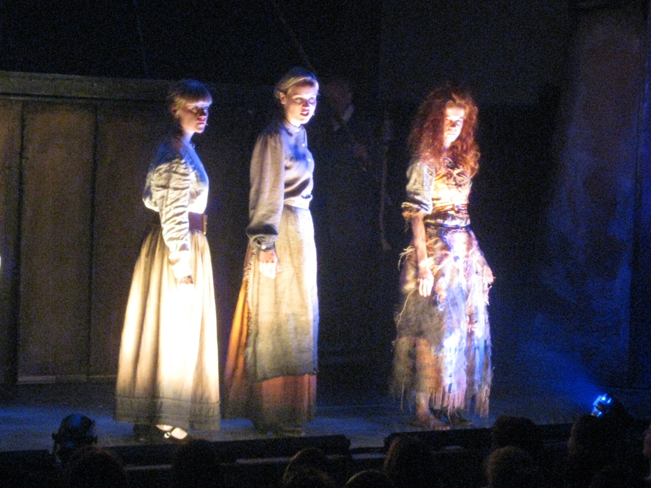 Scène uit de musical Sweeney Todd in mei 2016 in het Zonnehuis in Amsterdam Noord. Met April van Amelsvoort, Willemien Dijkstra en Marjolein Teepen